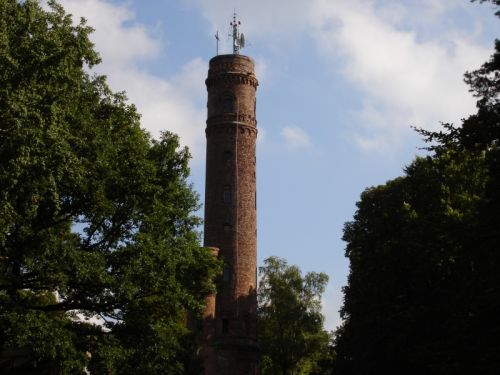 Wieża widokowa (31,5 m) na Górze Chełmskiej (Góra Krzyżanka) koło Koszalina. Autor: Piotr "savek" Saweczko . Data: 2005-11-27.